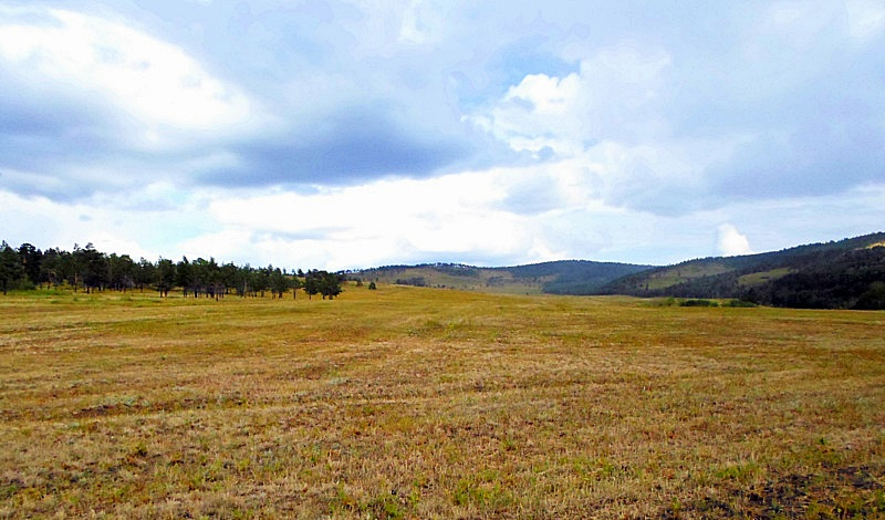 Юго-запад Моностоя. Вдали - водораздельный гребень. Степной участок после сенокоса.